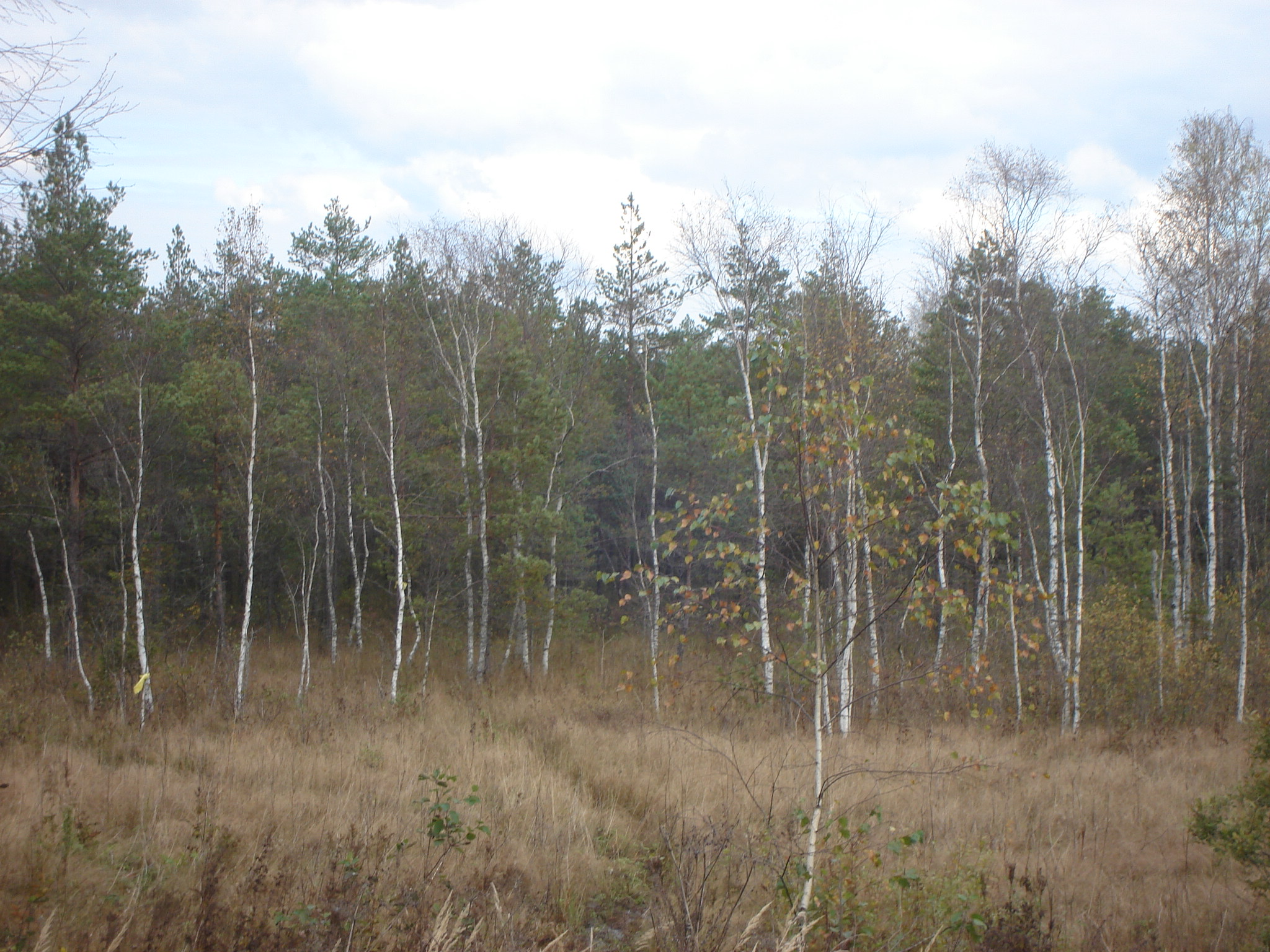 Zvārdes purvs